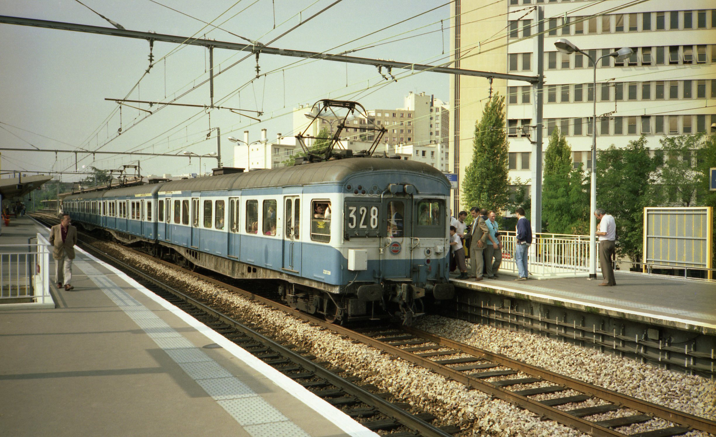 Oud ligne de Sceaux materieel. Gescande negatief Depicted place: Laplace